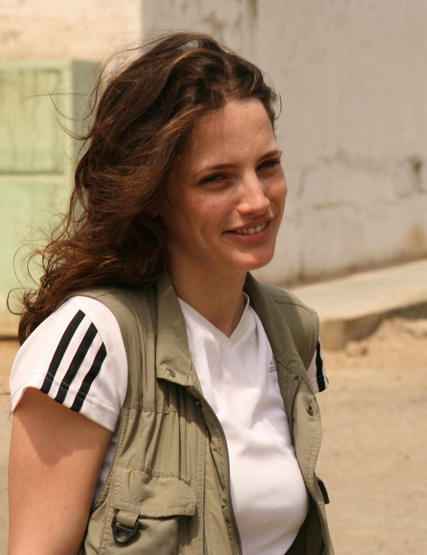 נועה מימן על סט הסרט – אוי מאמא